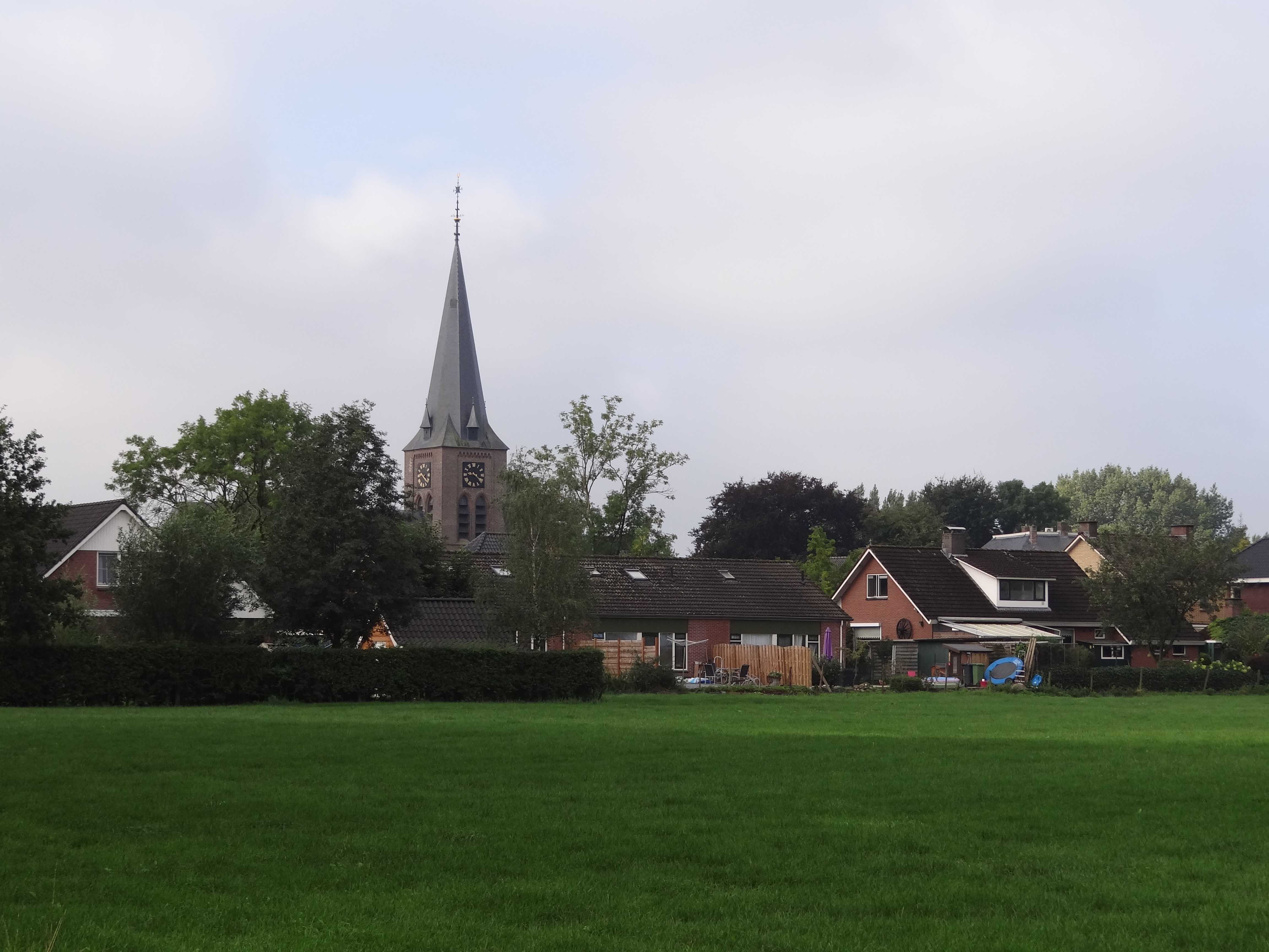 Netterden